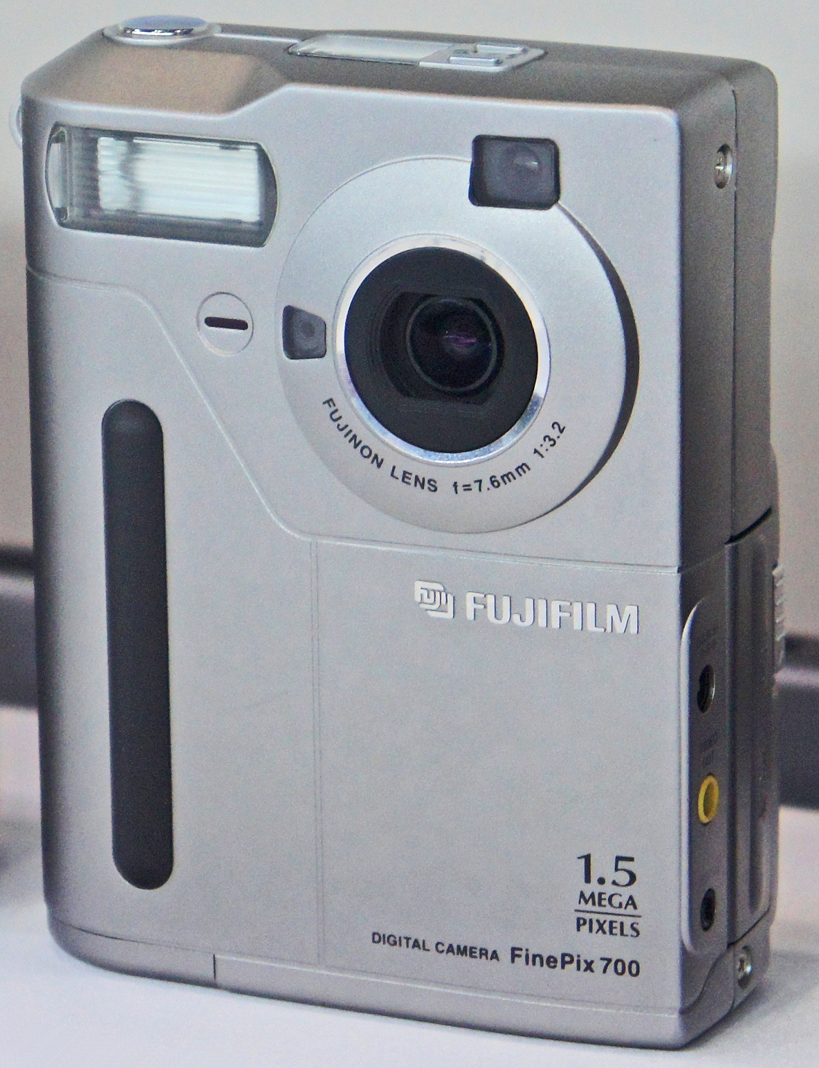 CP+ 2011: 1998 Fujifilm FinePix 700